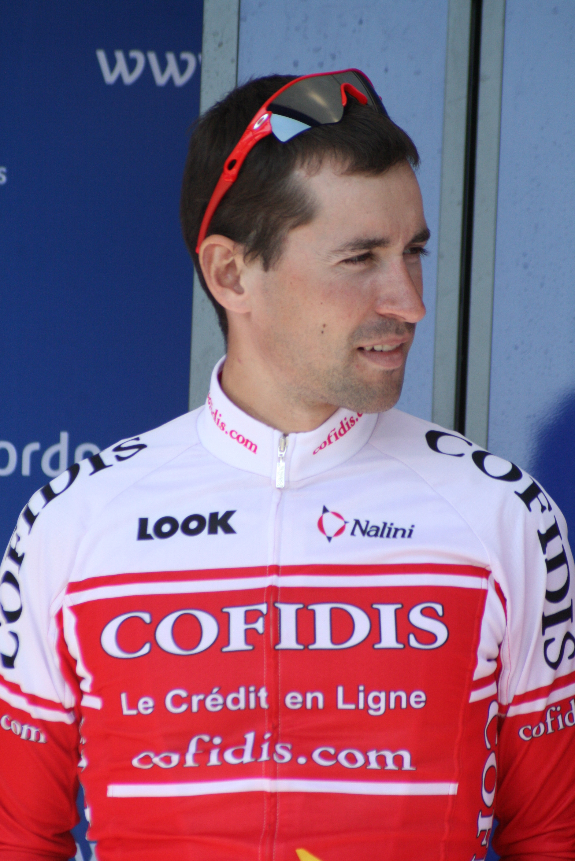 Présentation des coureurs au départ de la première étape Rémi Cusin